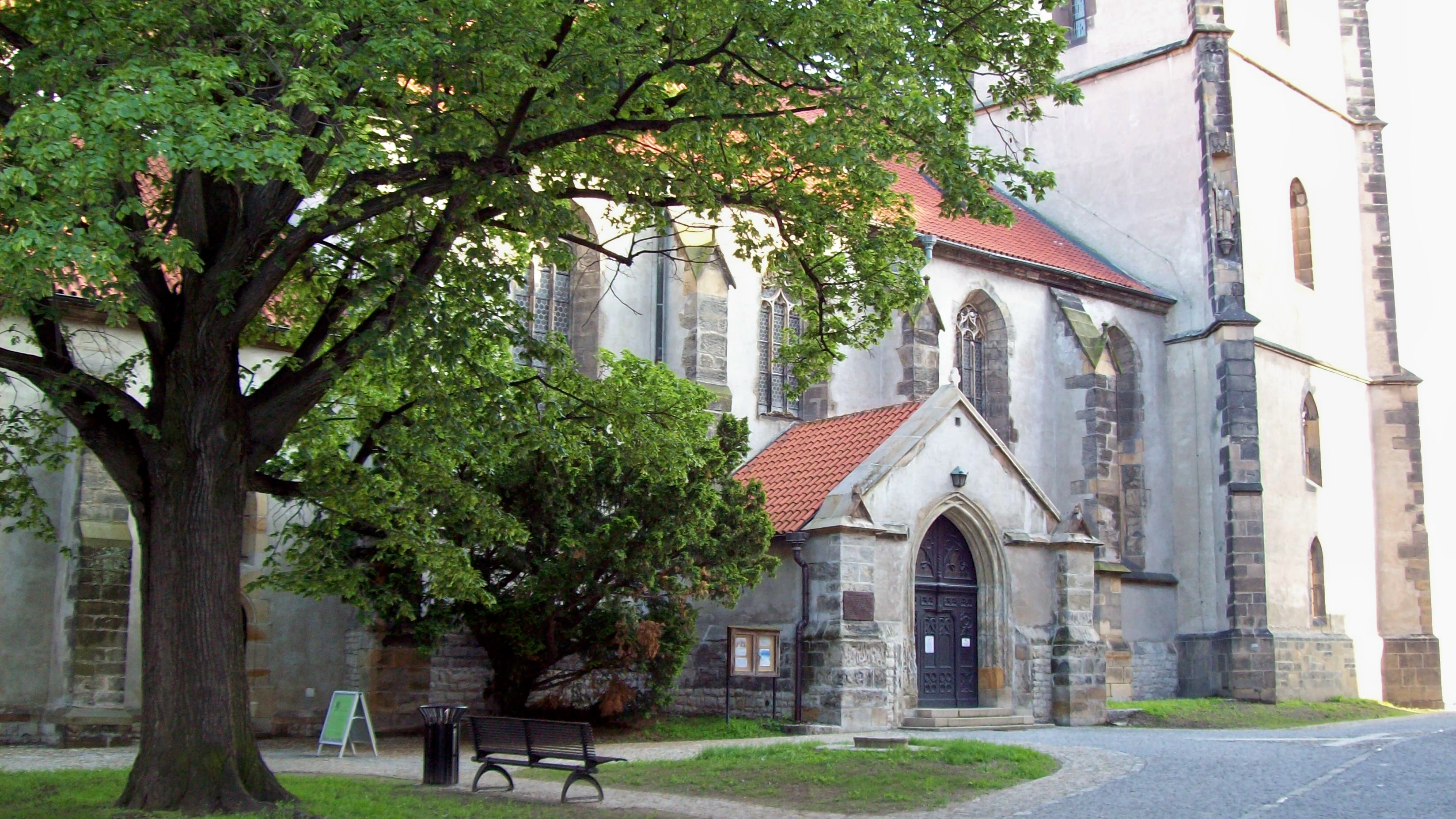 Vstup do kostela svatého Petra a Pavla v Mělníku.